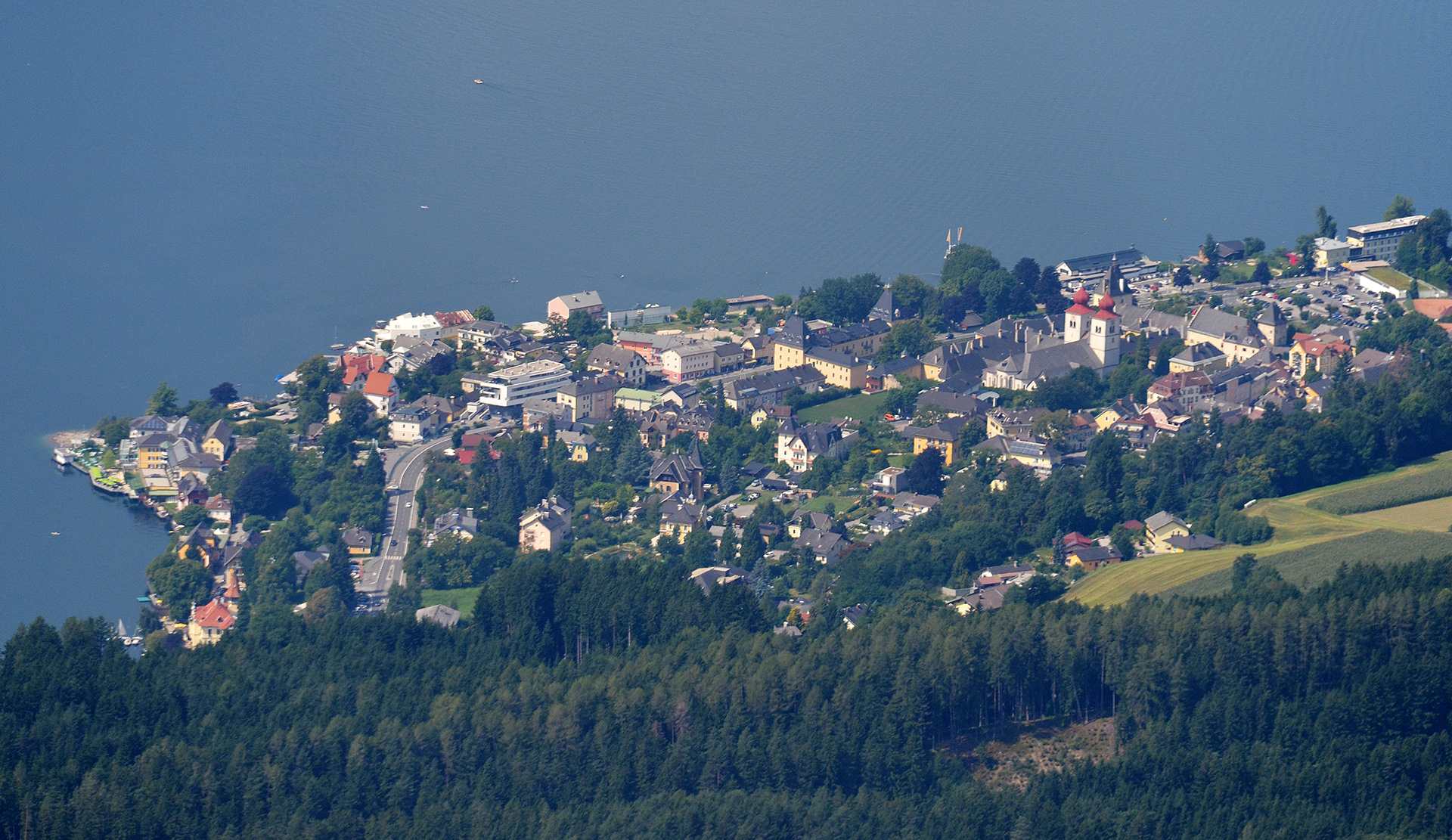 Millstatt am See von oben